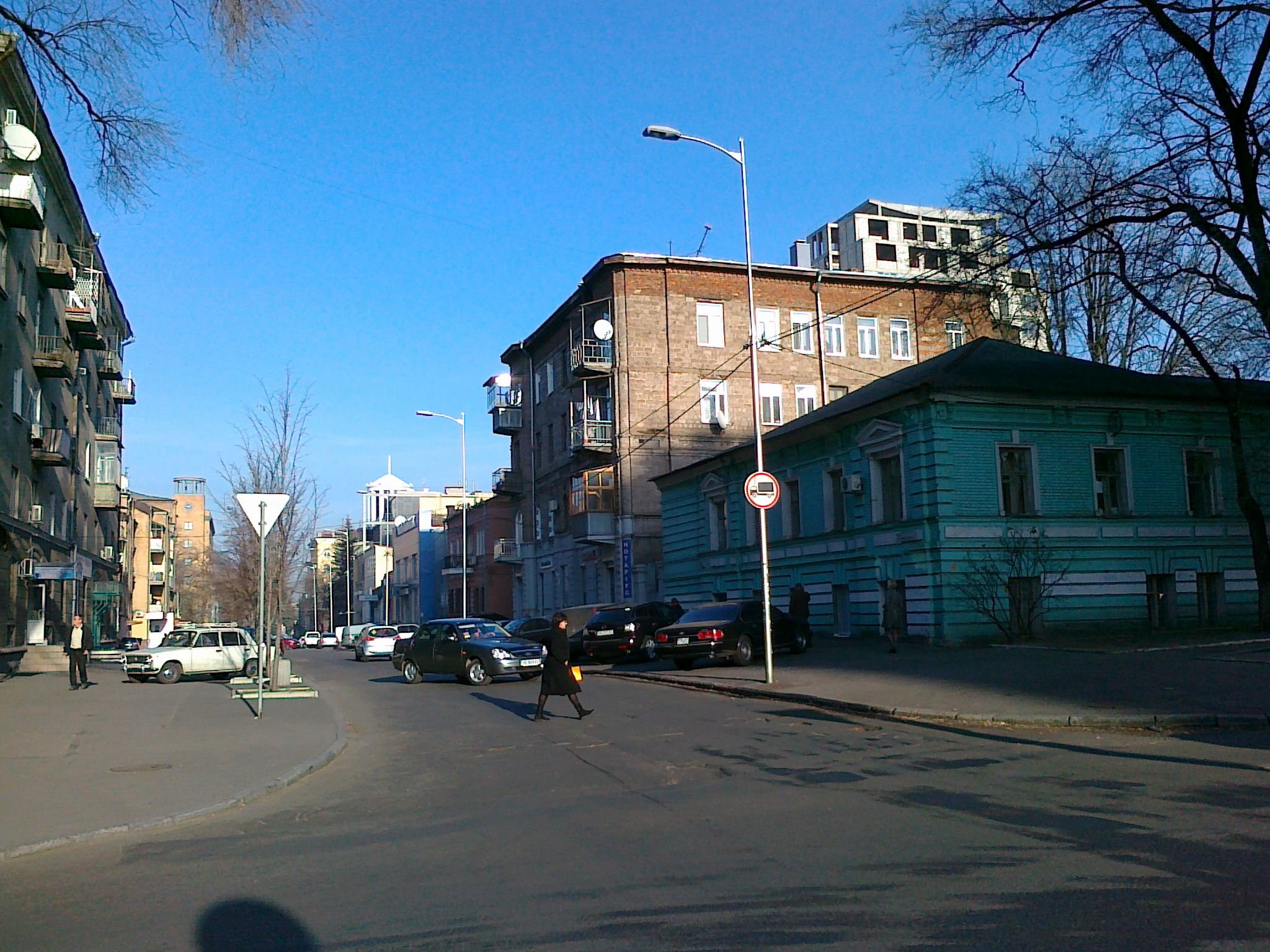 Ул. Жуковского в направлении просп. К. Маркса